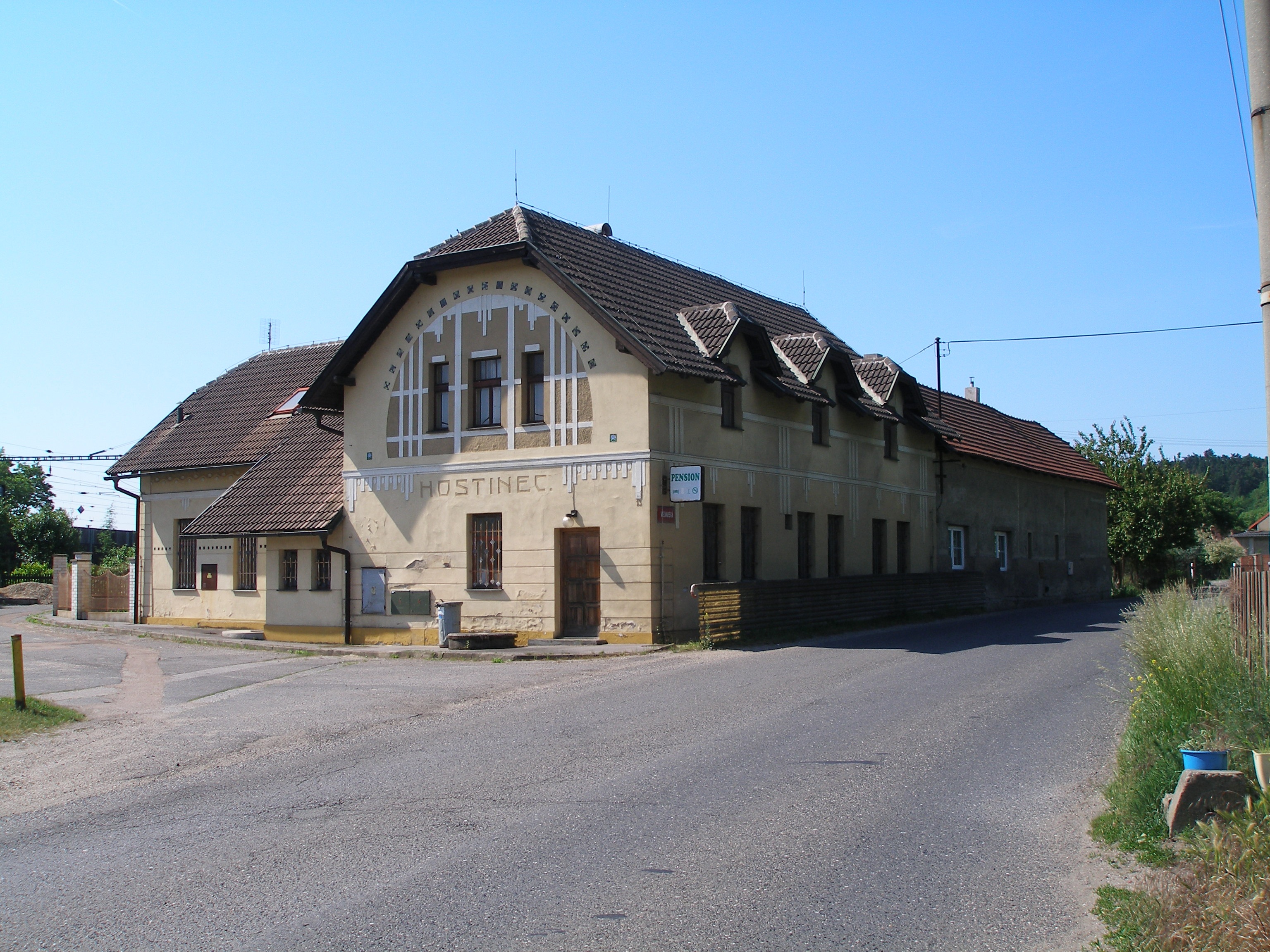 Hostinec v Podhořanech.